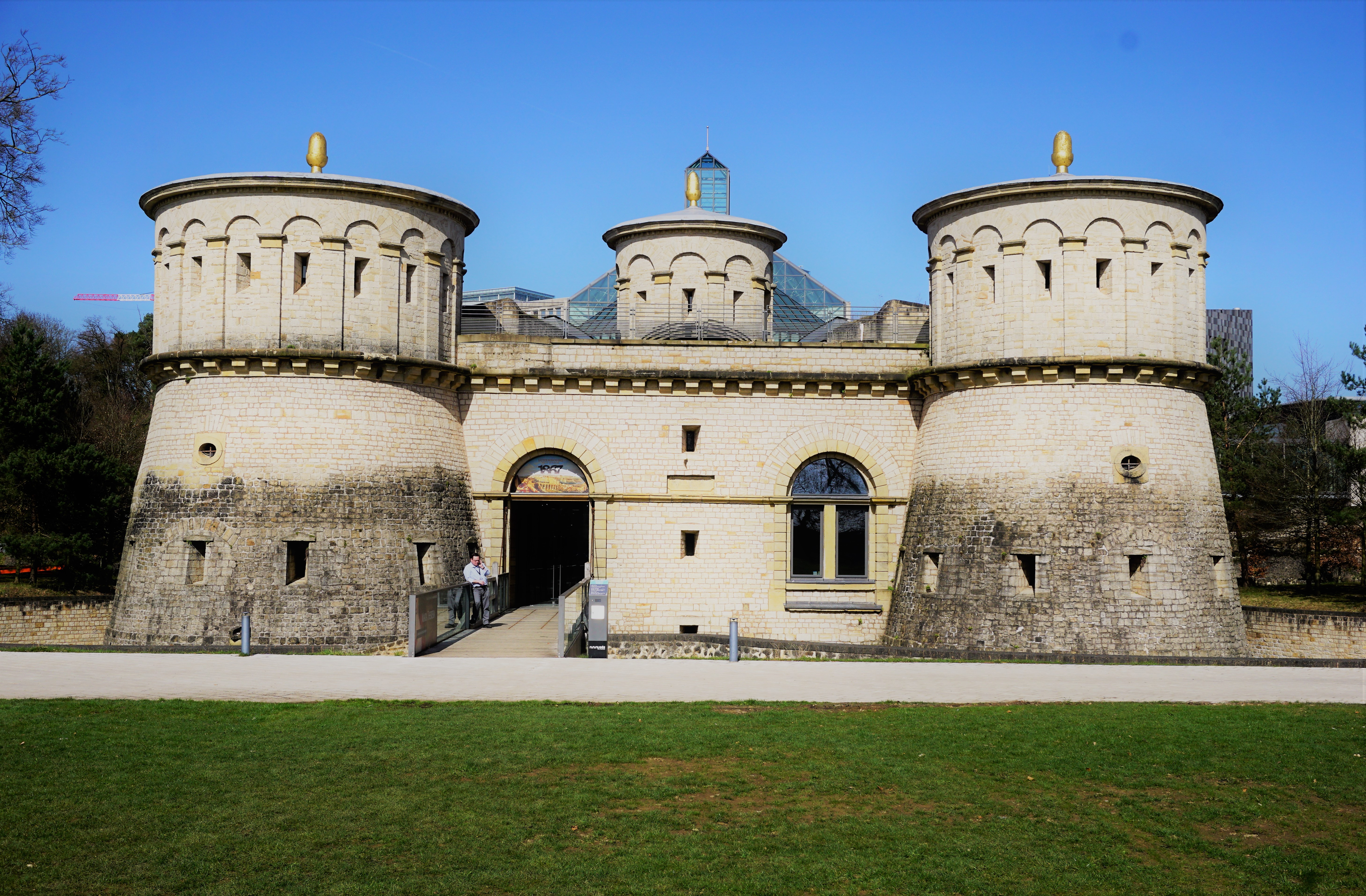 Luxembourg, le Fort Thüngen (Dräi Eechelen, Trois Glands) abritant le Musée Dräi Eechelen.